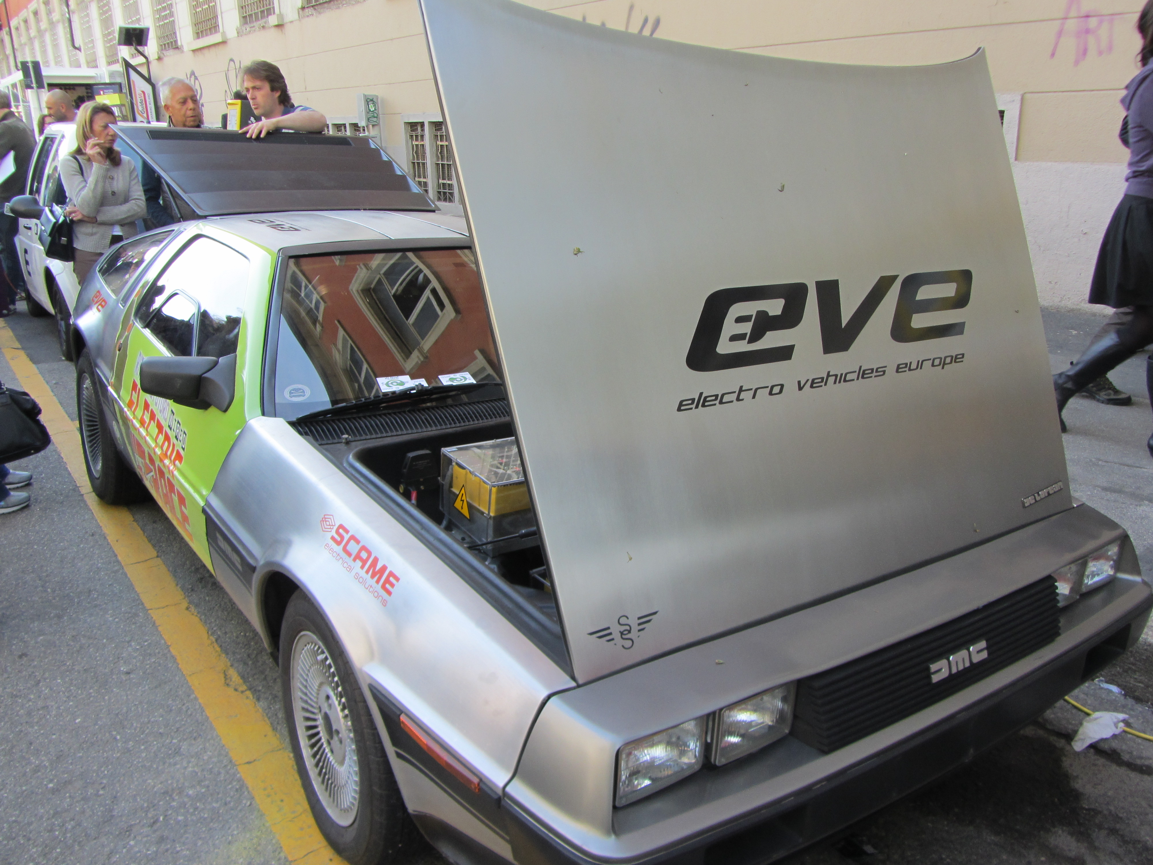 Impianto elettrico realizzato dall'azienda italiana EVE: Electro Vehicles Europe sulla base di una DeLorean DMC-12